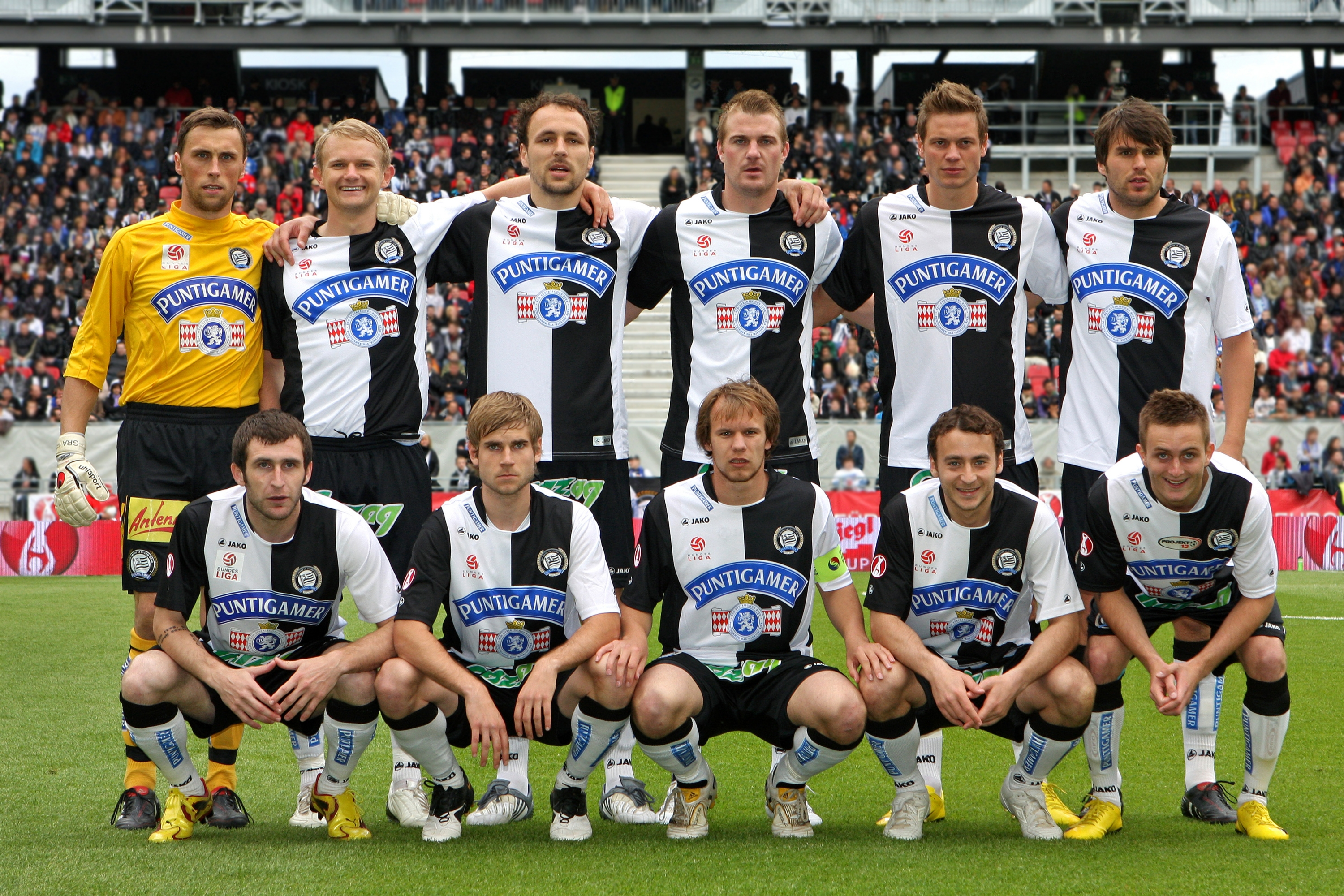 Endspiel im Österreichischer Fußball-Cup 2009/10 SC Magna Wiener Neustadt gegen SK Sturm Graz 0:1 (0:0) am 16. Mai 2010 im Wörtherseestadion in Klagenfurt - Die Mannschaft des SK Sturm Graz